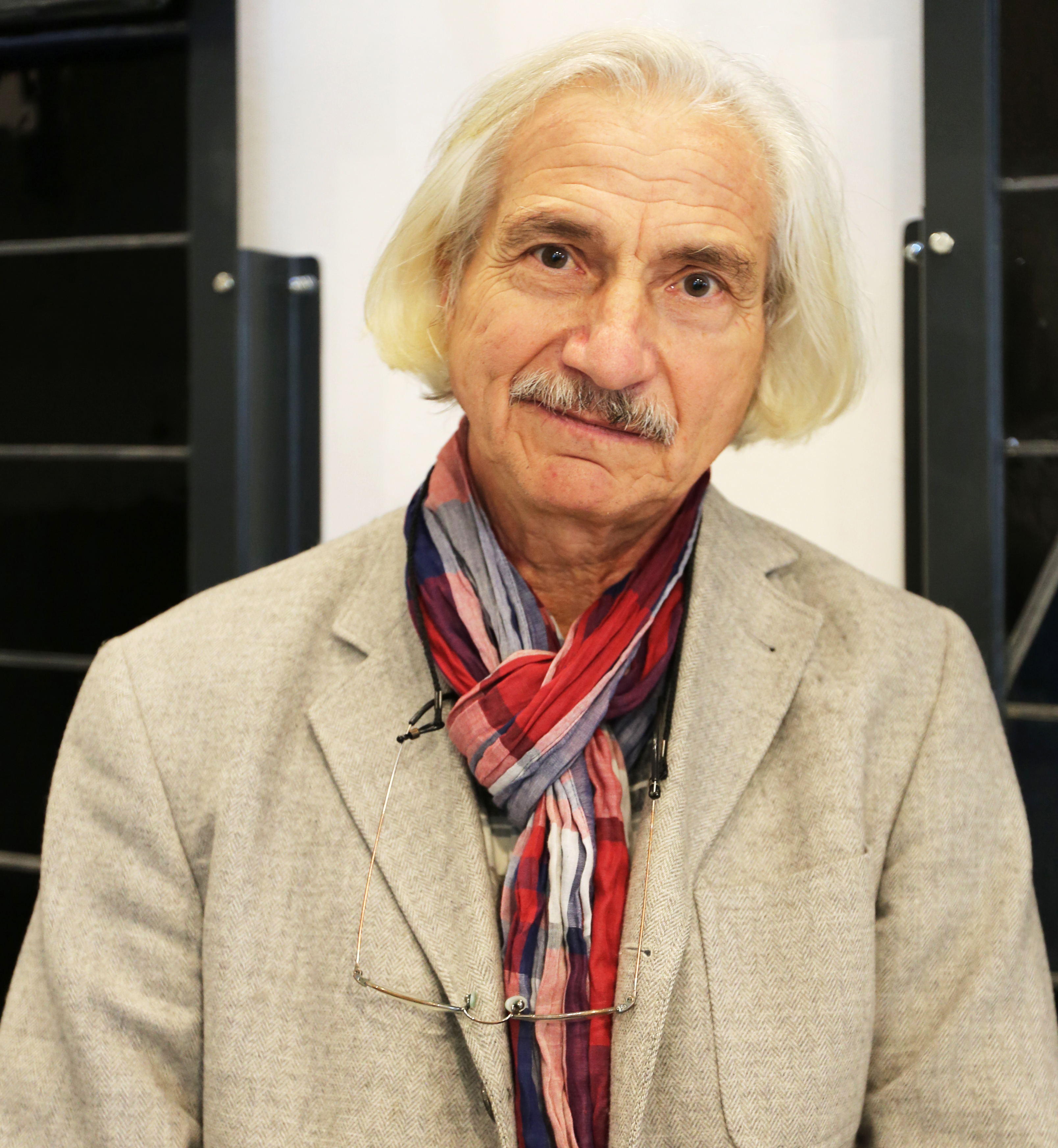 Dieter Steves, Pfarrer der Evangelischen Matthäus-Kirchengemeinde Hürth im Ruhestand